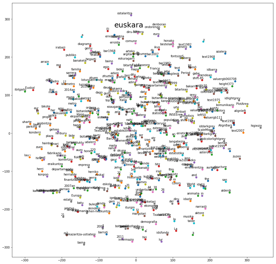 Hitz batzuen errepresentazioa